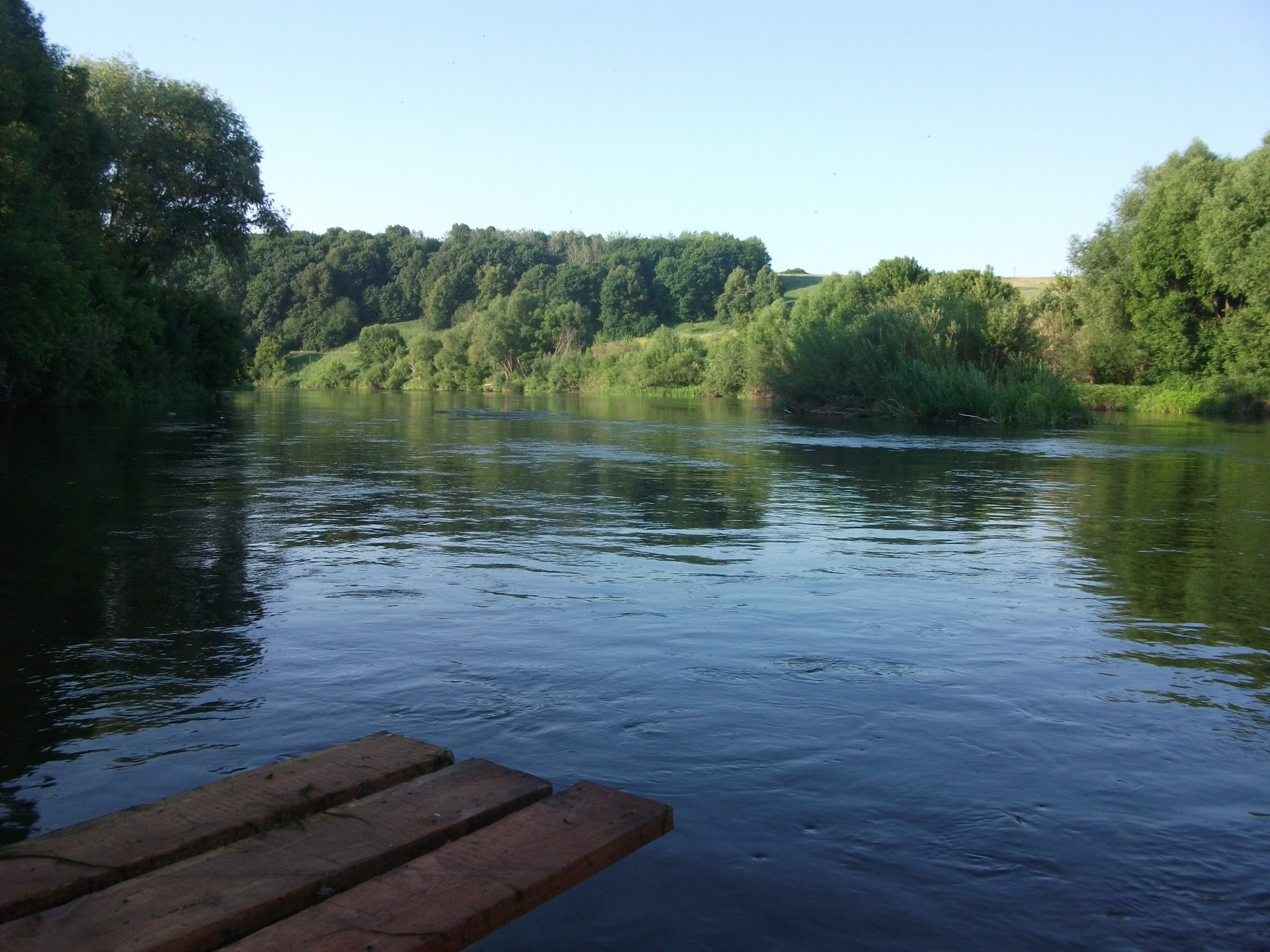 утро на реке